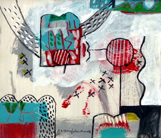 Acryl auf Karton, 18 x 21 cm